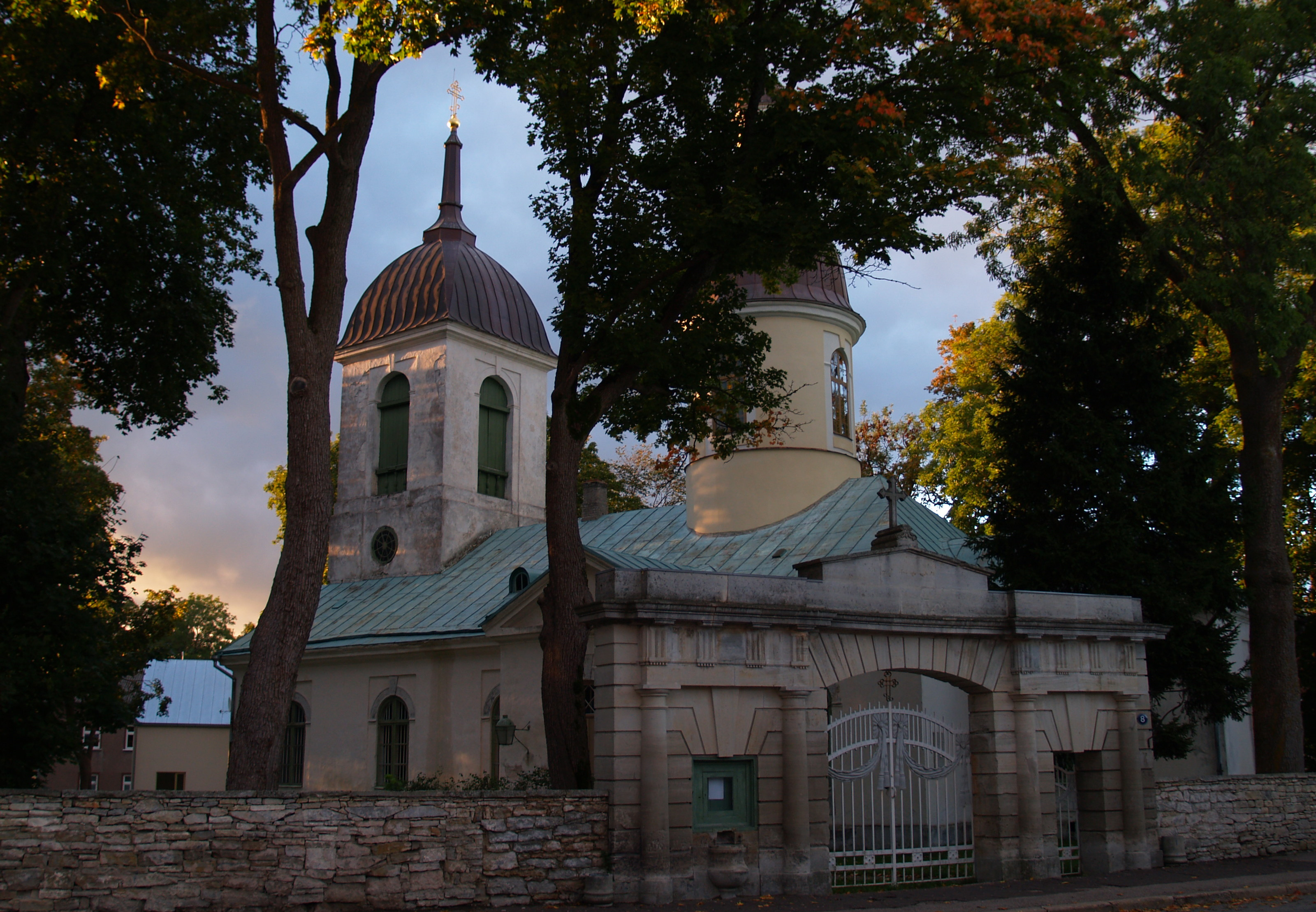 Kuressaare Püha Nikolai kirik